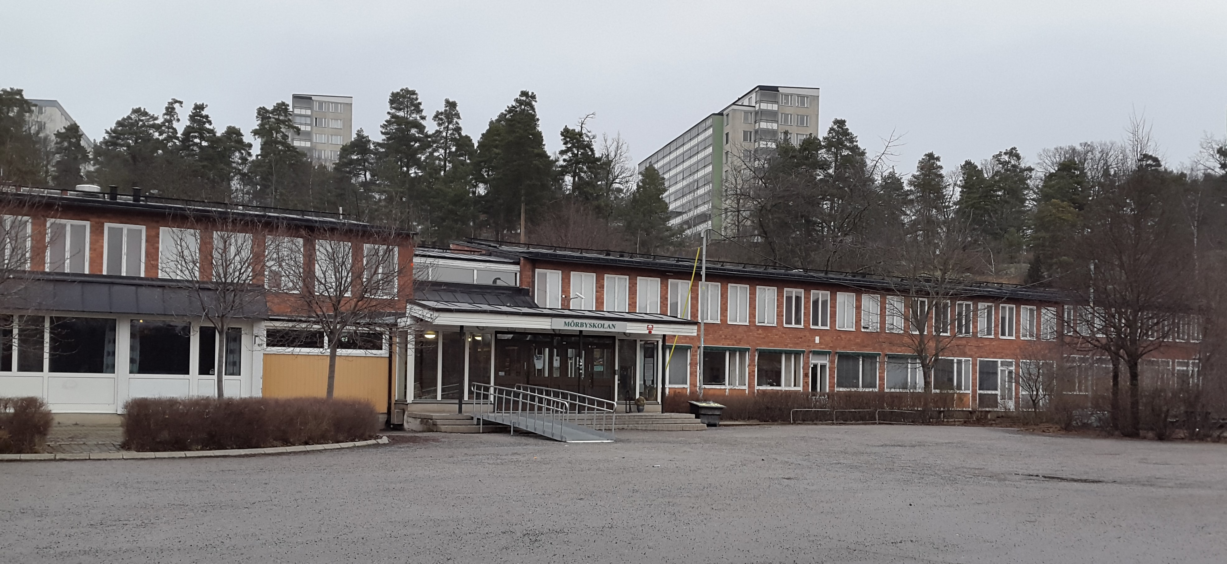 Mörbyskolan i Danderyd, tidigare Mörby läroverk, vy mot norr. Mars 2016